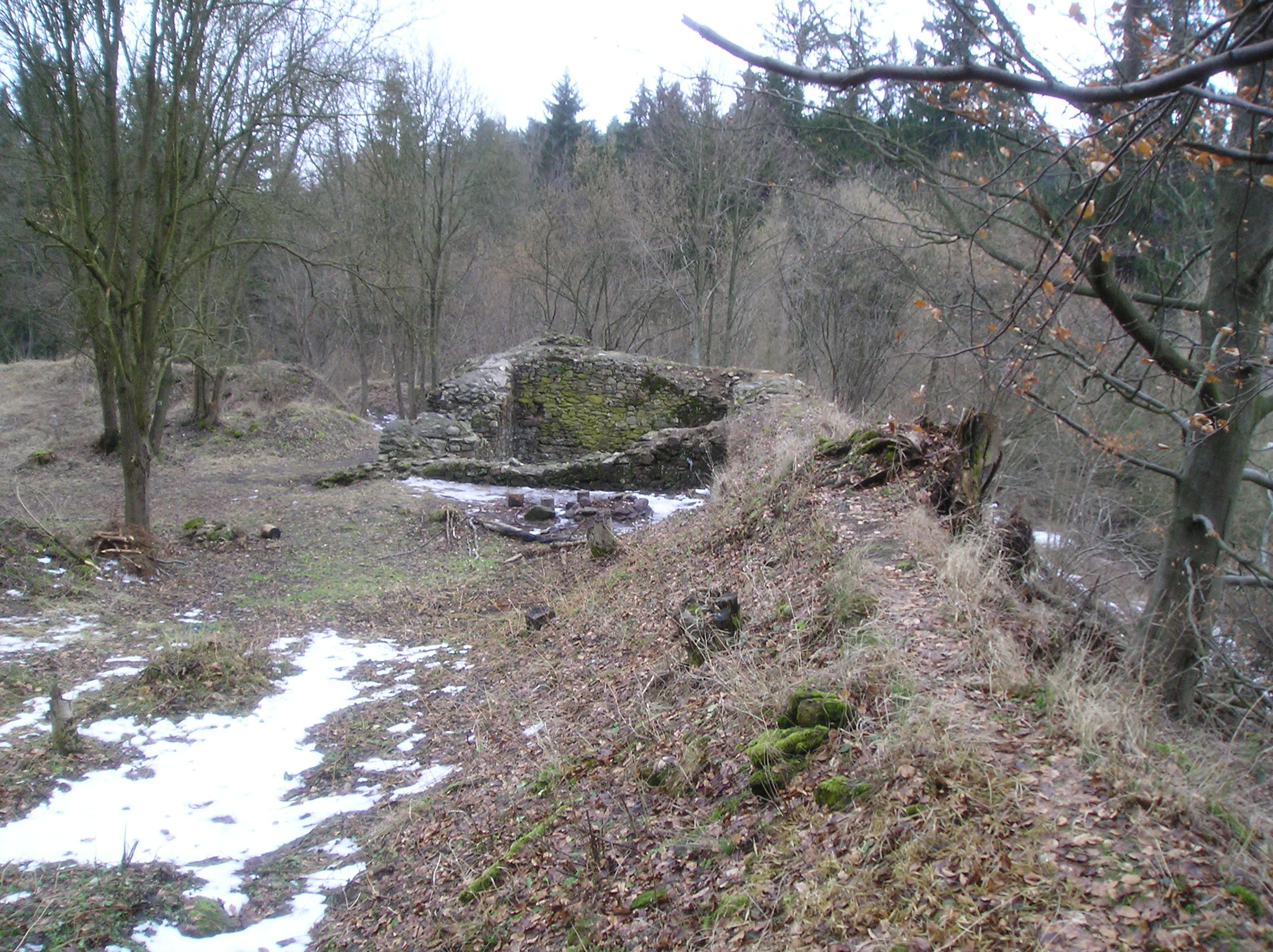 Zbytky paláce na Ronovci.